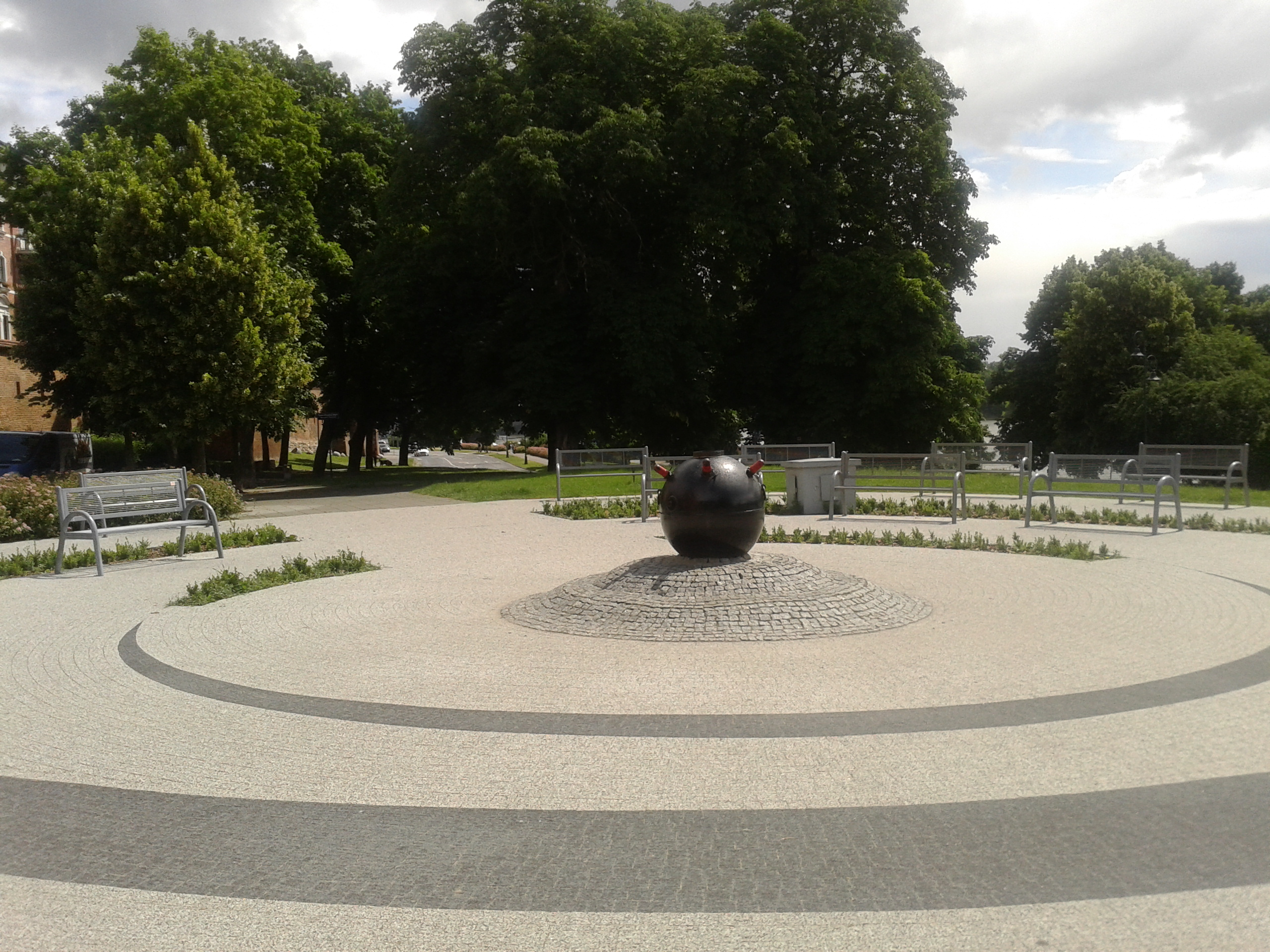 Mina morska przy Bramie Klasztornej w Toruniu, na Skwerze Oficerskiej Szkoły Marynarki Wojennej